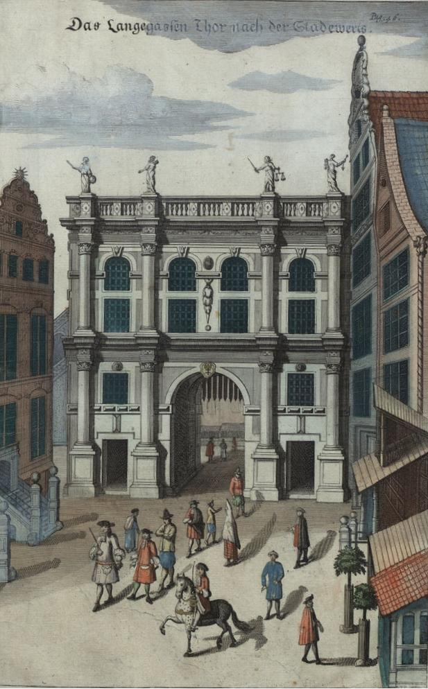 Gdańsk Główne Miasto, ul. Długa - Brama Złota, XIV, XVII